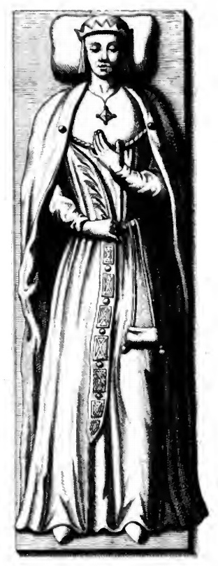 Ce monument se trouvait dans le cloître du prieuré Saint-Pierre de Châtenois. Il a sans doute été détruit à la Révolution.